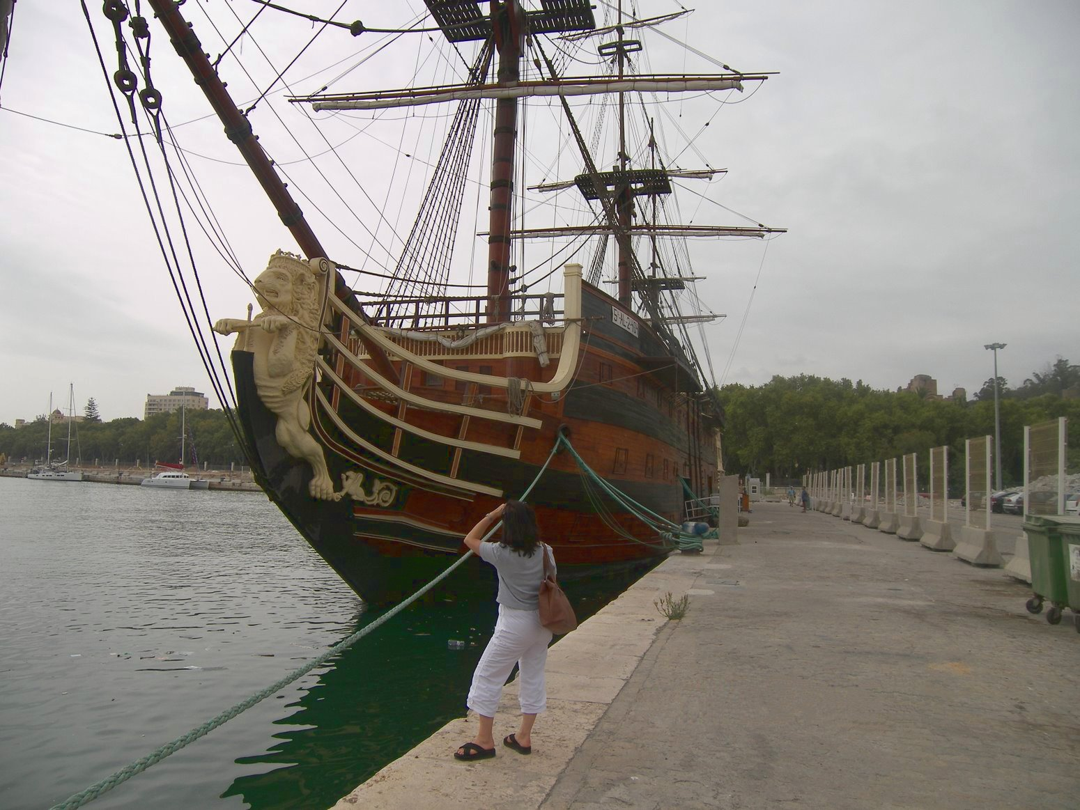 Replica del navio de 1ª Santísima Trinidad, Málaga. A pesar del título la réplica hace referencia a un buque de línia, no a un galeón.